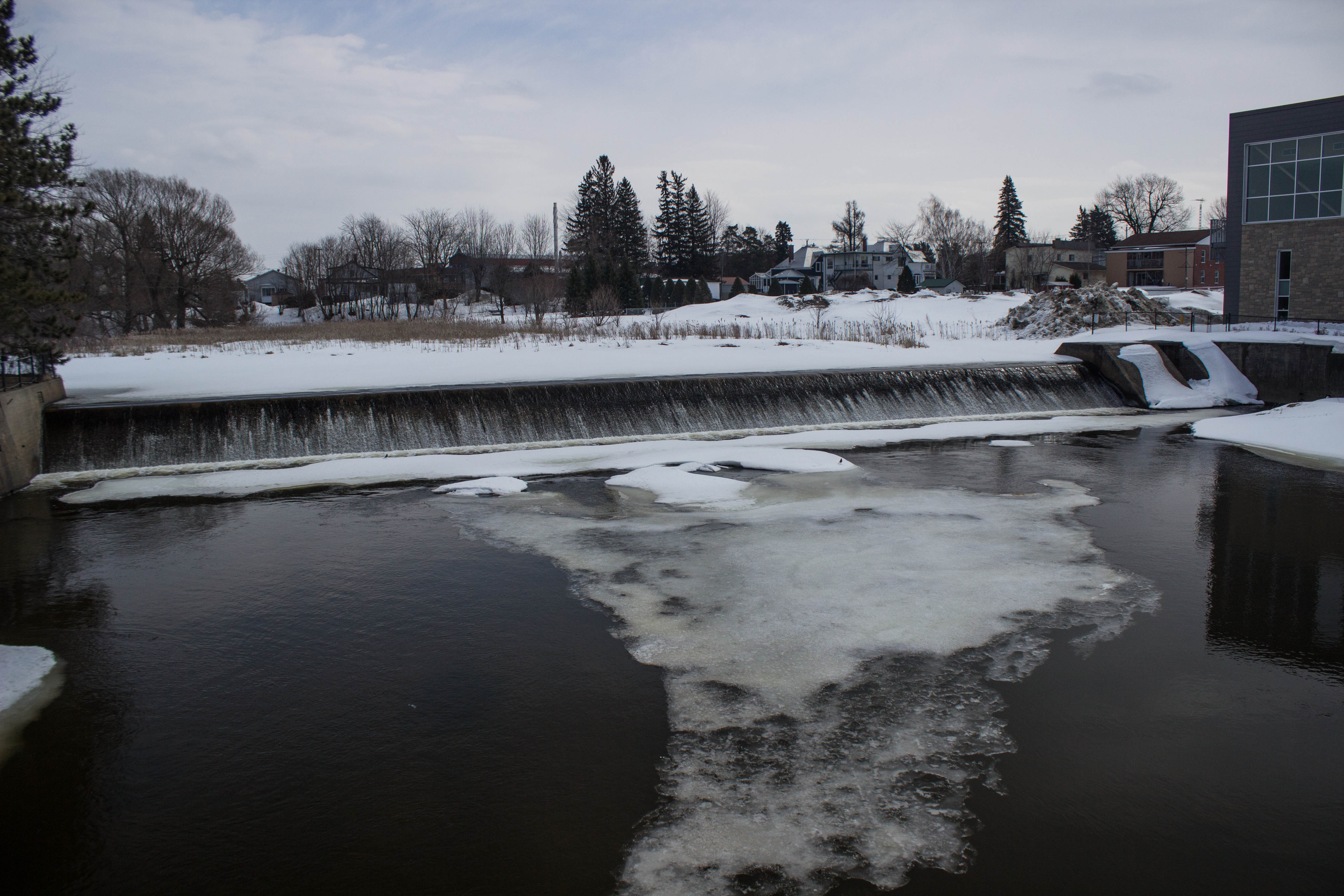 Barrage Saint-André (X0005762) sur la rivière le Renne à Acton Vale. Construit en 1955 selon le CEHQ (